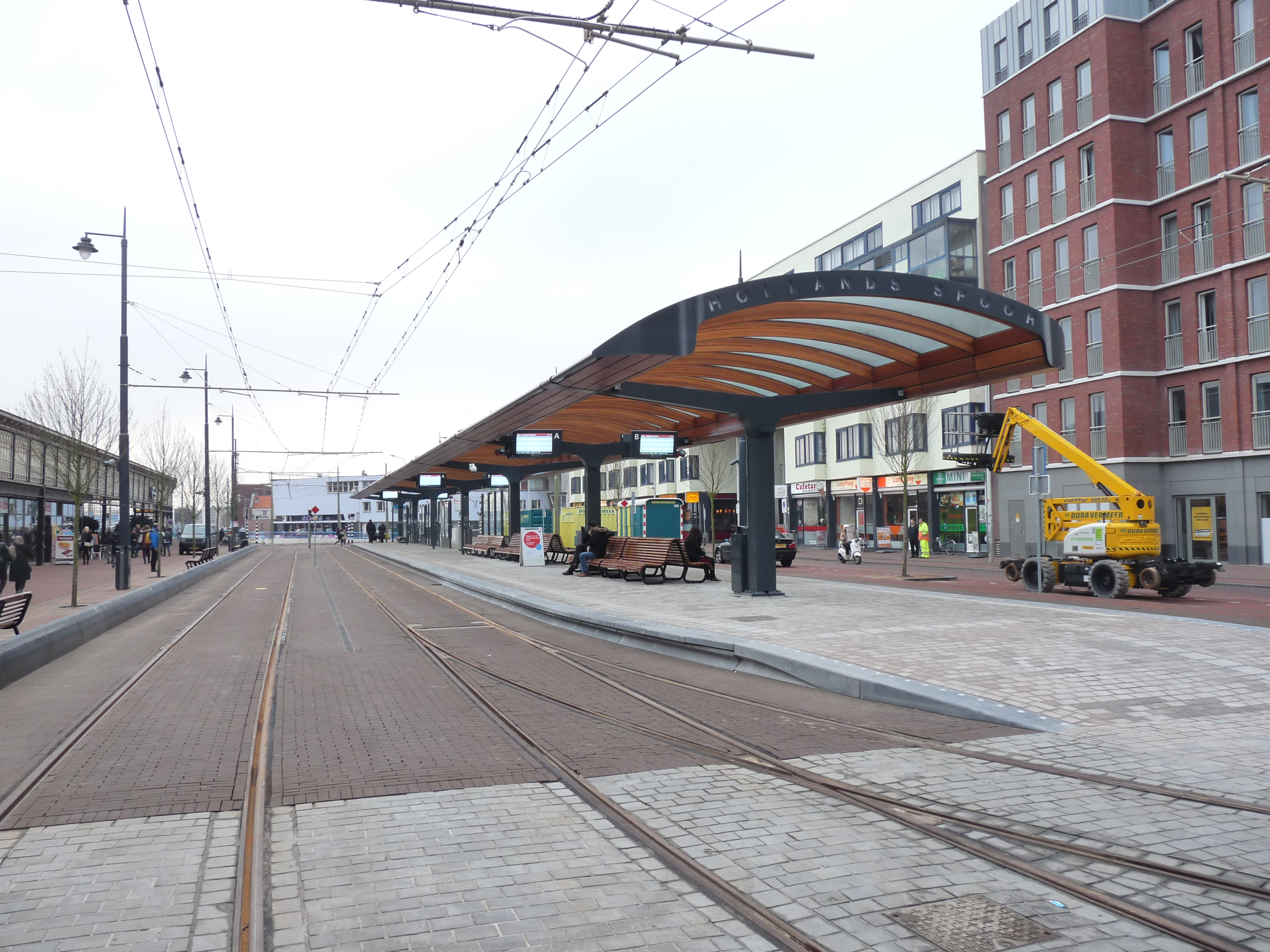 Nieuwe tramhalte bij HS Den Haag